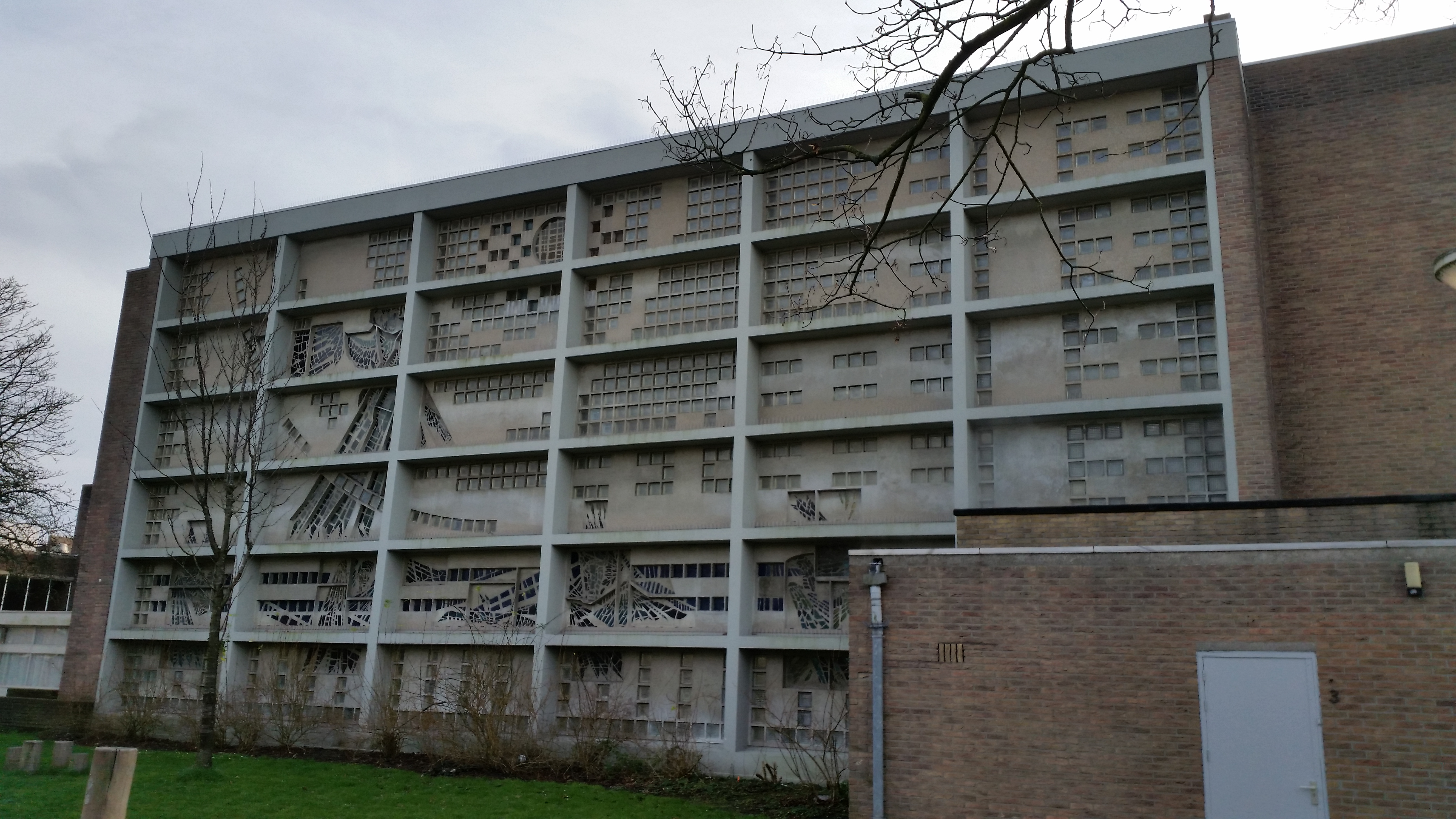 Impressie van de Koningskerk, Watergraafsmeer, Amsterdam-Oost; januari 2020